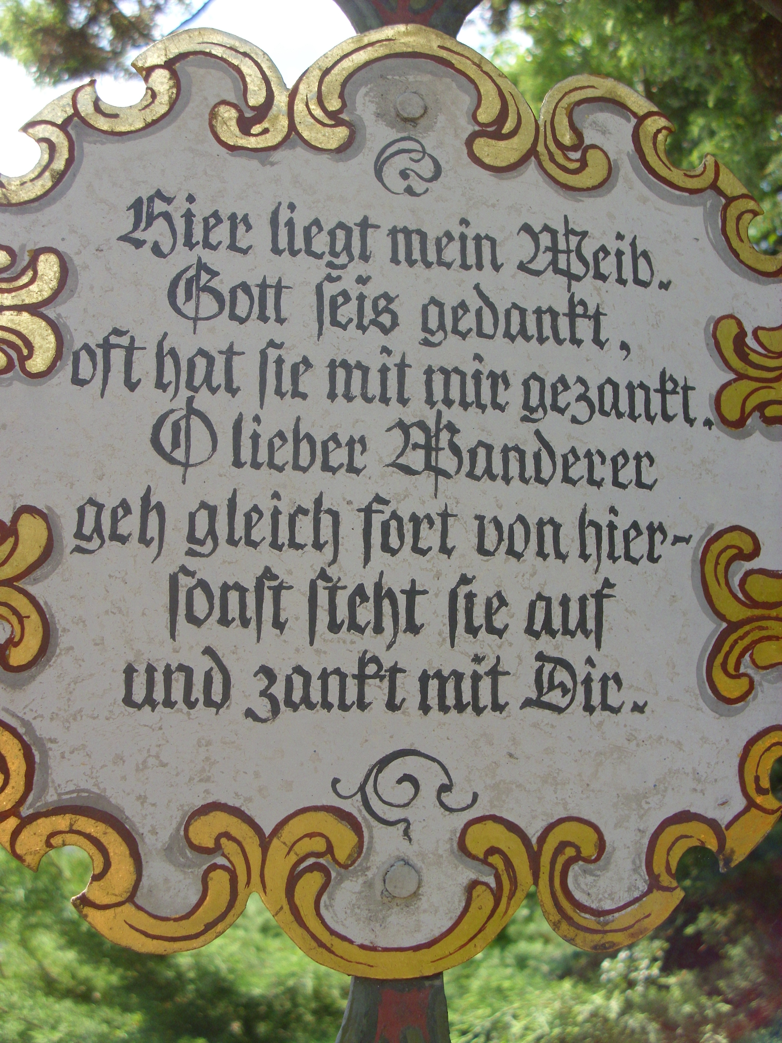 Grabkreuz des Museumsfriedhof in Kramsach